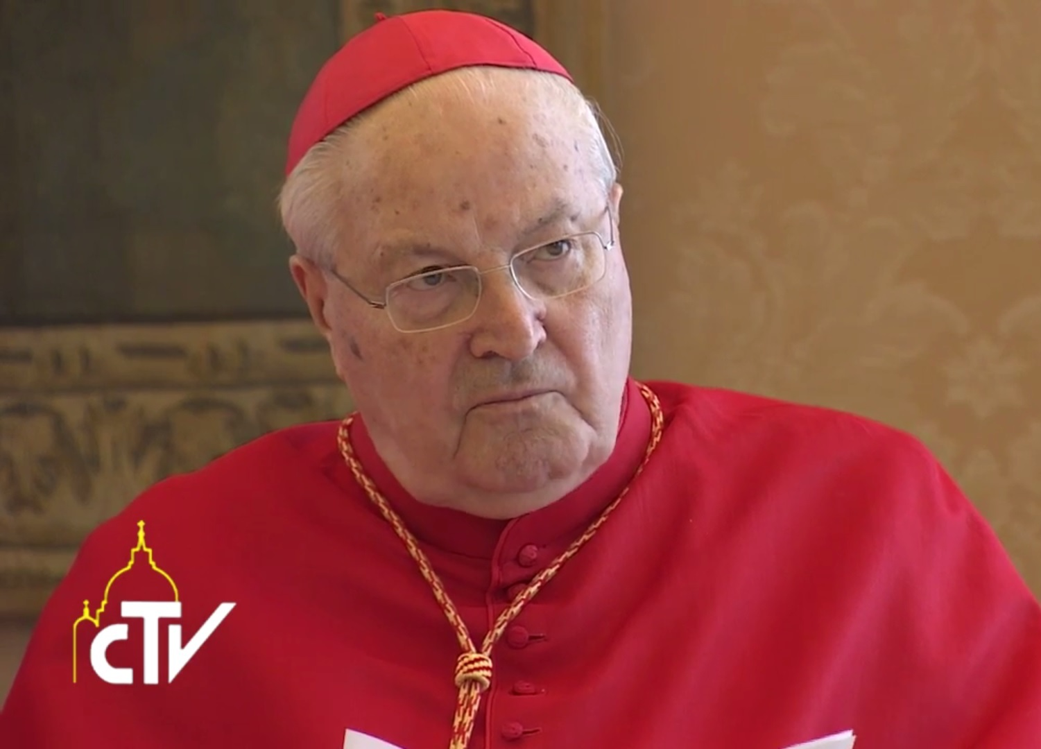 Le cardinal Angelo Sodano au cours du consistoire ordinaire public donné par le pape François le 15 mars 2016.